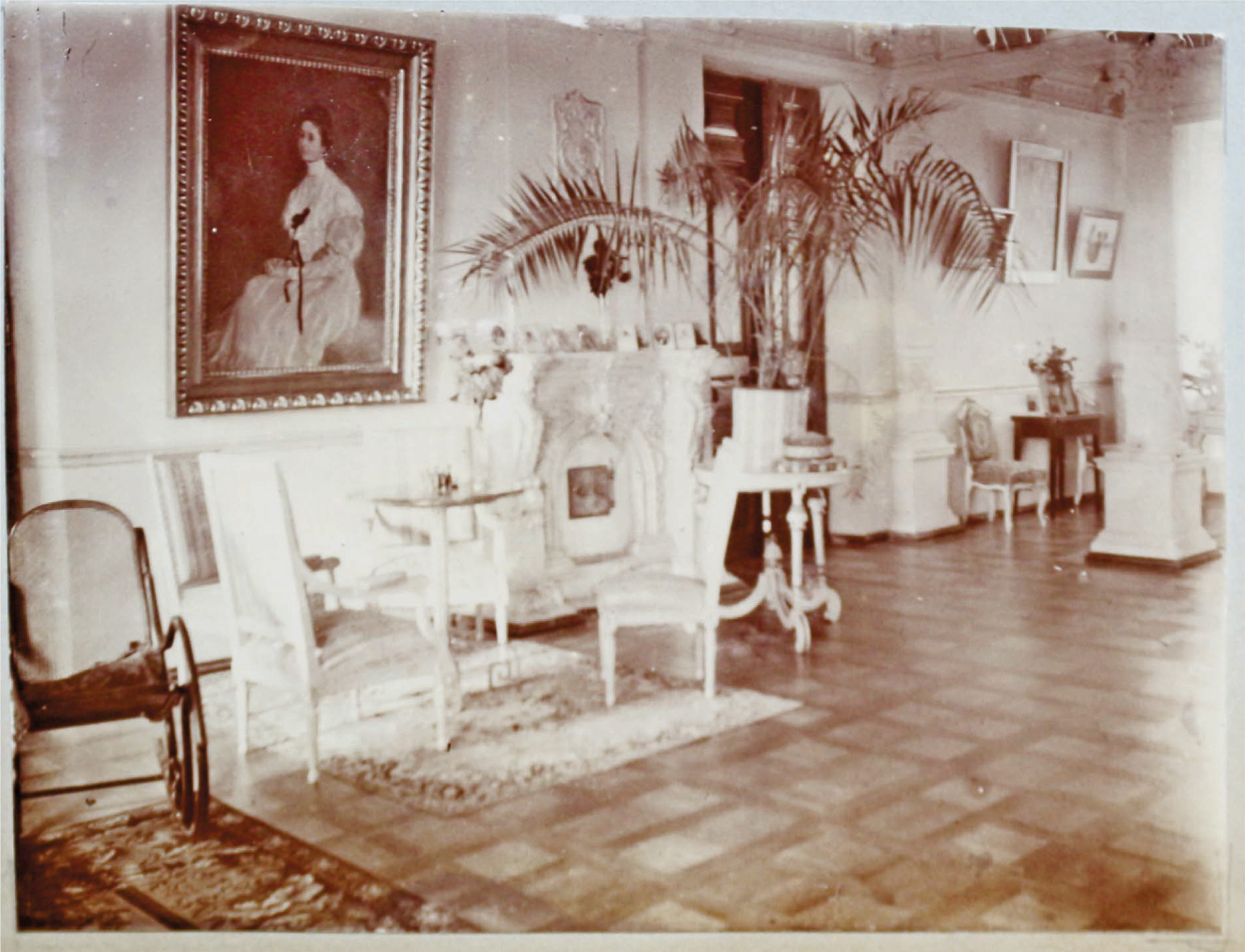 Беларуская (тарашкевіца): Мацькаўцы (Maćkaŭcy), сядзіба Багдановічаў (Bahdanovič)